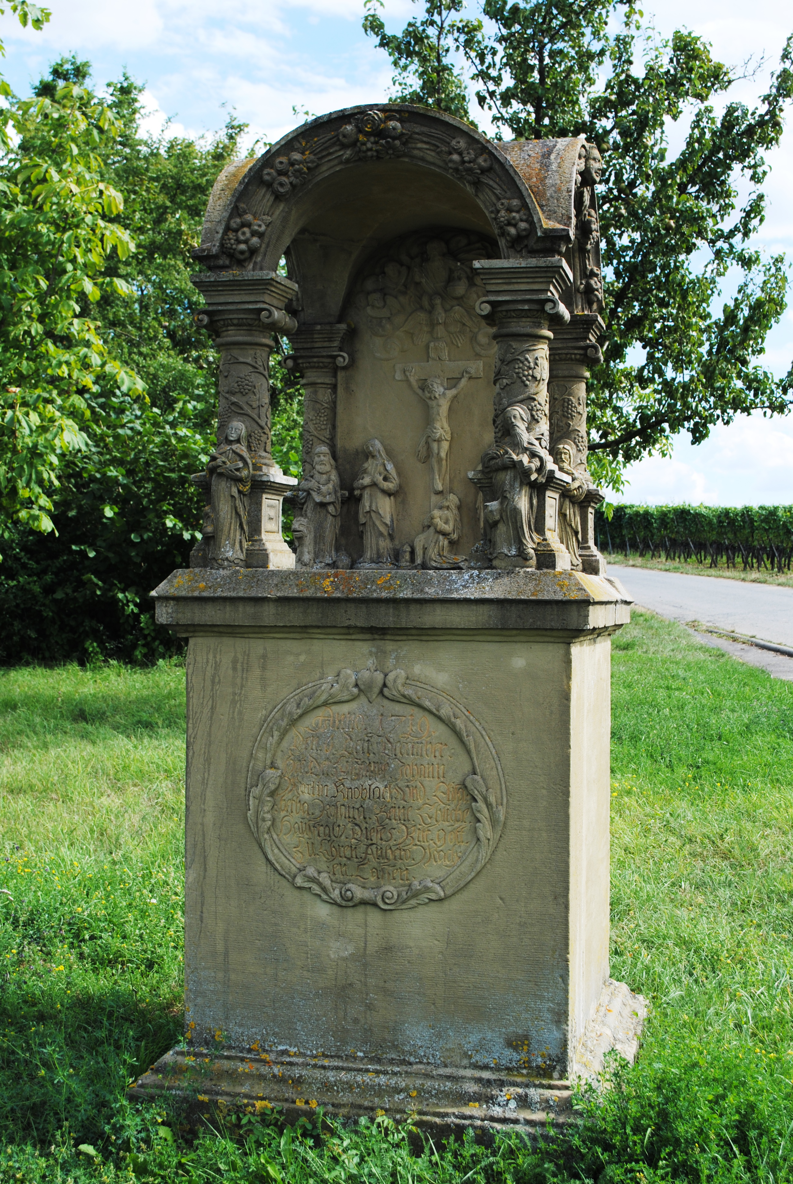 Altarbildstock, Nordheim am Main, Kreuzberg, Weg zur Hallburg